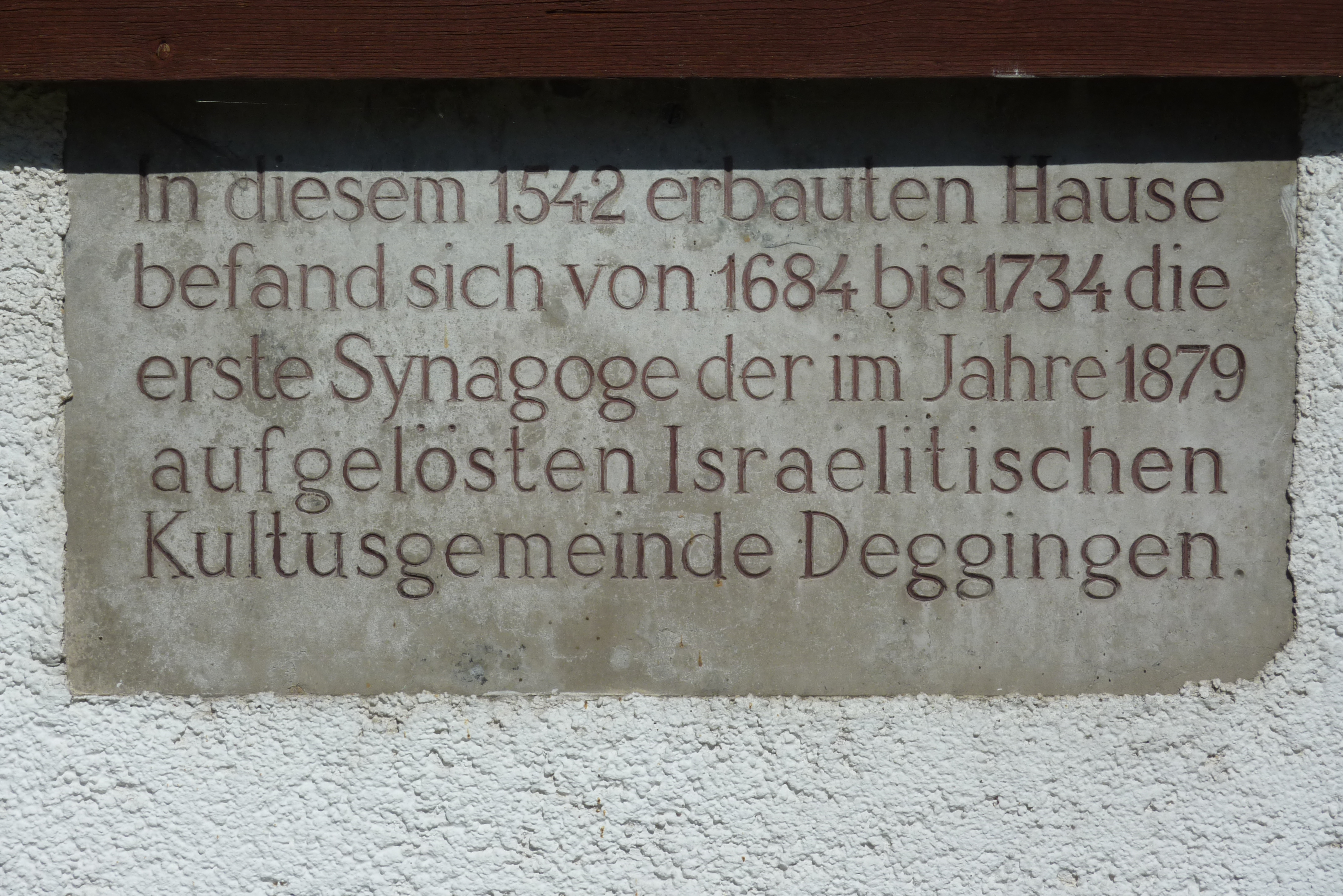 Tafel an der ehemaligen Synagoge in Mönchsdeggingen